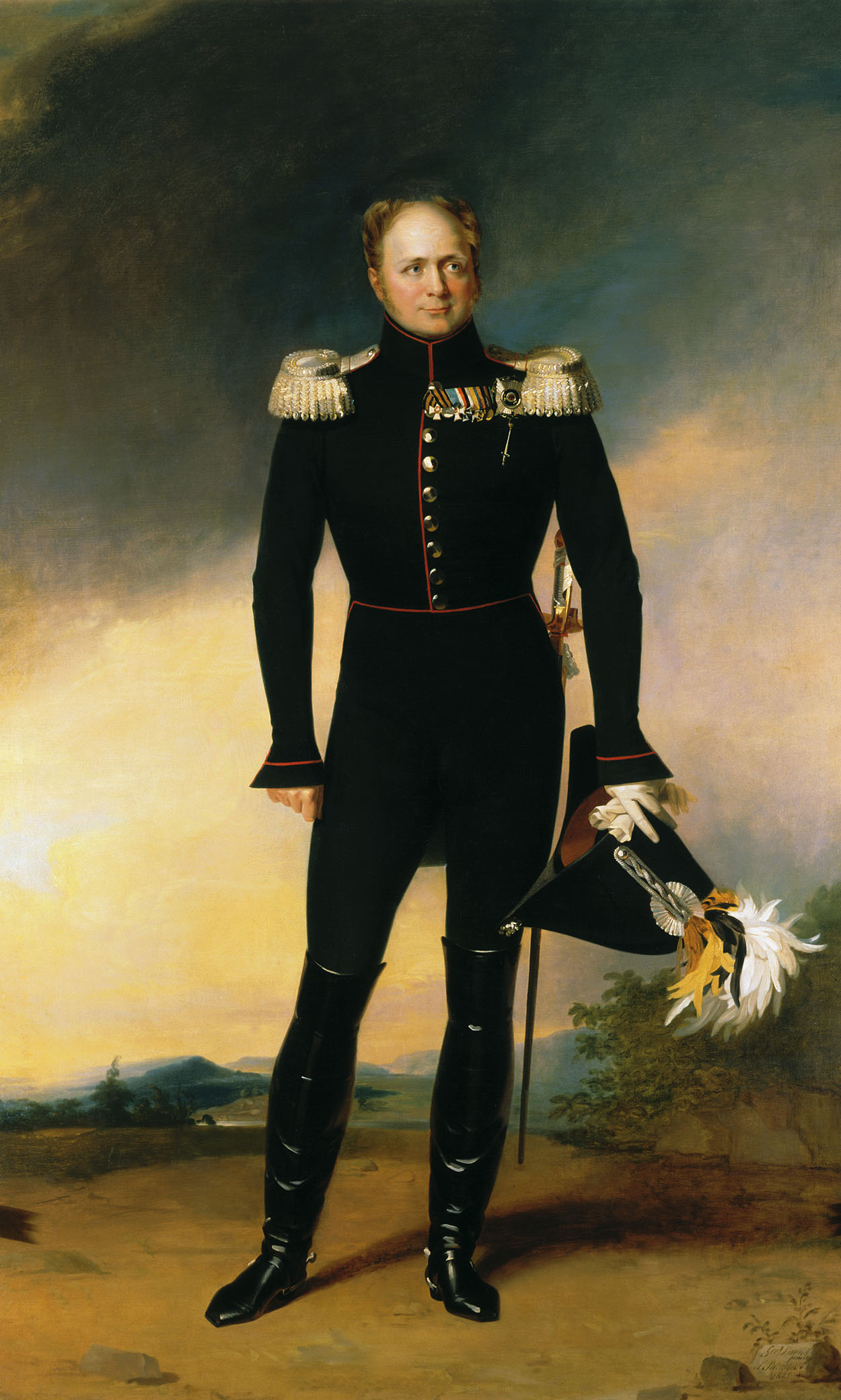 Портрет Царя Освободителя Кисти Джорджа Доу/ Государственный художественно-архитектурный дворцово-парковый музей-заповедник «Петергоф»